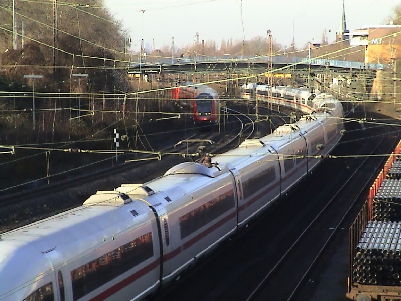 Mülheim an der Ruhr: Bahnstrecke von Mülheim nach Duisburg im Stadtteil Styrum. Links ein Regionalexpress, vermutlich der Linie RE6, auf dem Weg nach Mülheim Hauptbahnhof, rechts ein ICE3 auf dem Weg nach Duisburg. Zwischen den beiden befahrenen Fernbahngleisen liegen die S-Bahn-Gleise, am rechten Bildrand Gleise des Güterbahnhofs Mülheim West. Im Hintergrund rechts das Zentralstellwerk "Mf".